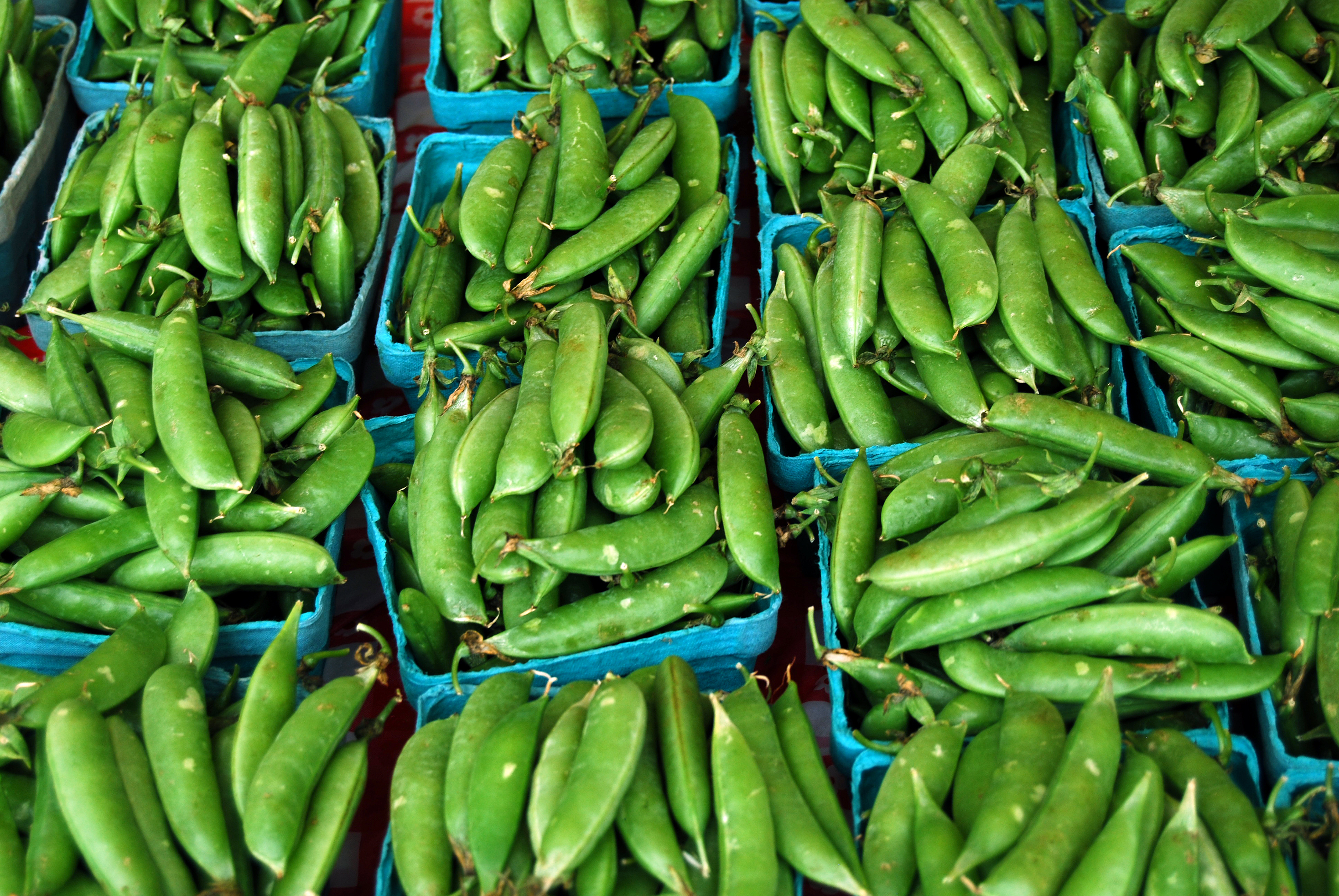 Sugar snaps in blauwe doosjes